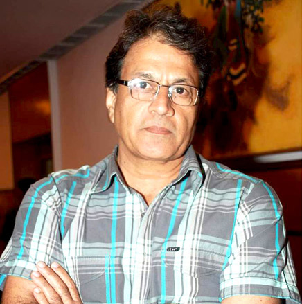 Arun Govil at Anup Jalota's ghazal bash